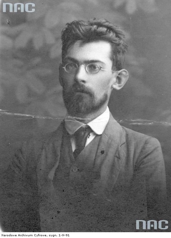 Kazimierz Chodynicki (1890-1942) - polski historyk